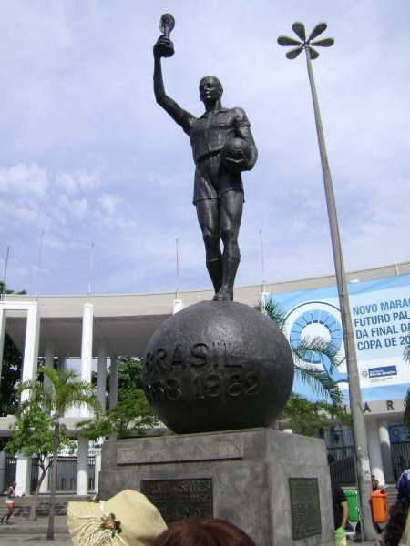 Estatua en la entrada de Maracana